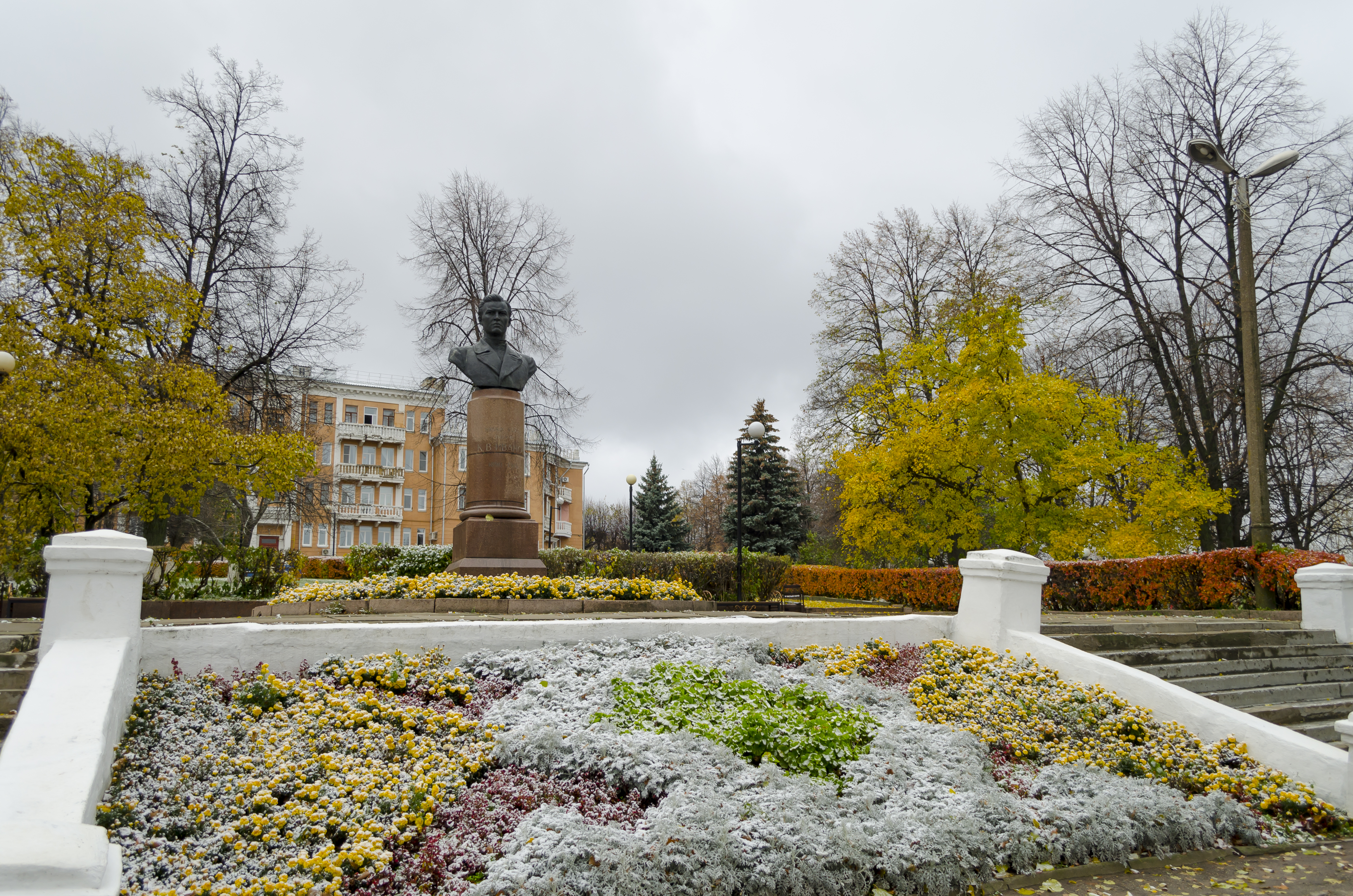 1952 г., архитектор В. И. Ступин, скульптор И. Ф. Кудрявцев